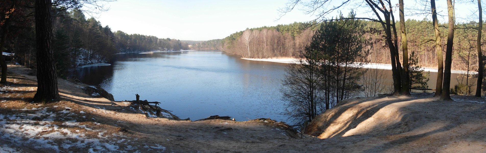 Brda w Bydgoszczy; zakole Brdy w Janowie